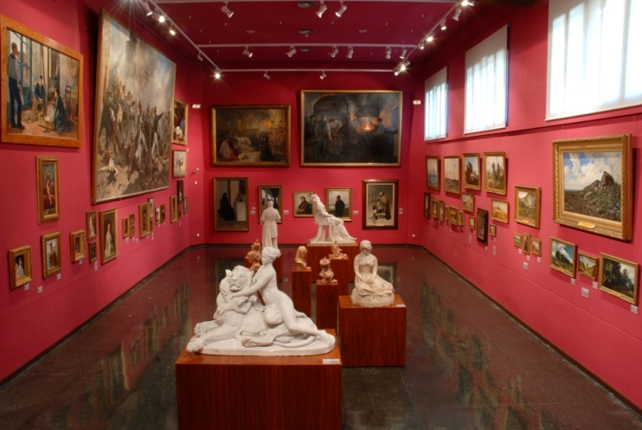 LaBiblioteca Museu Víctor Balaguer va néixer a finals del segle XIX amb la voluntat d%u2019oferir al públic l%u2019oportunitat de veure reunides múltiples col·leccions d%u2019art, llibres i etnografia que Víctor Balaguer havia atresorat al llarg de la seva vida.